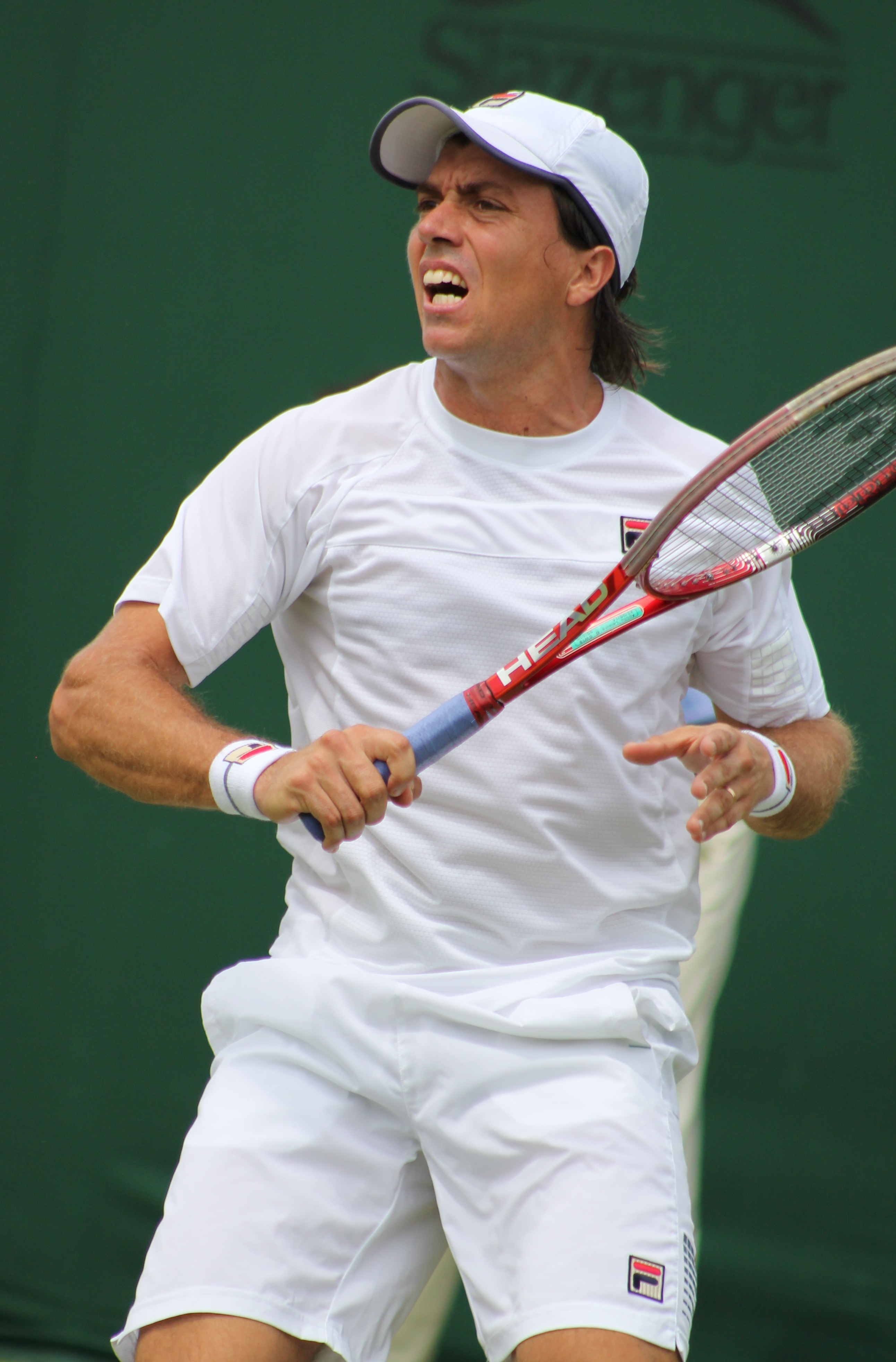 Berlocq WM14 (26)